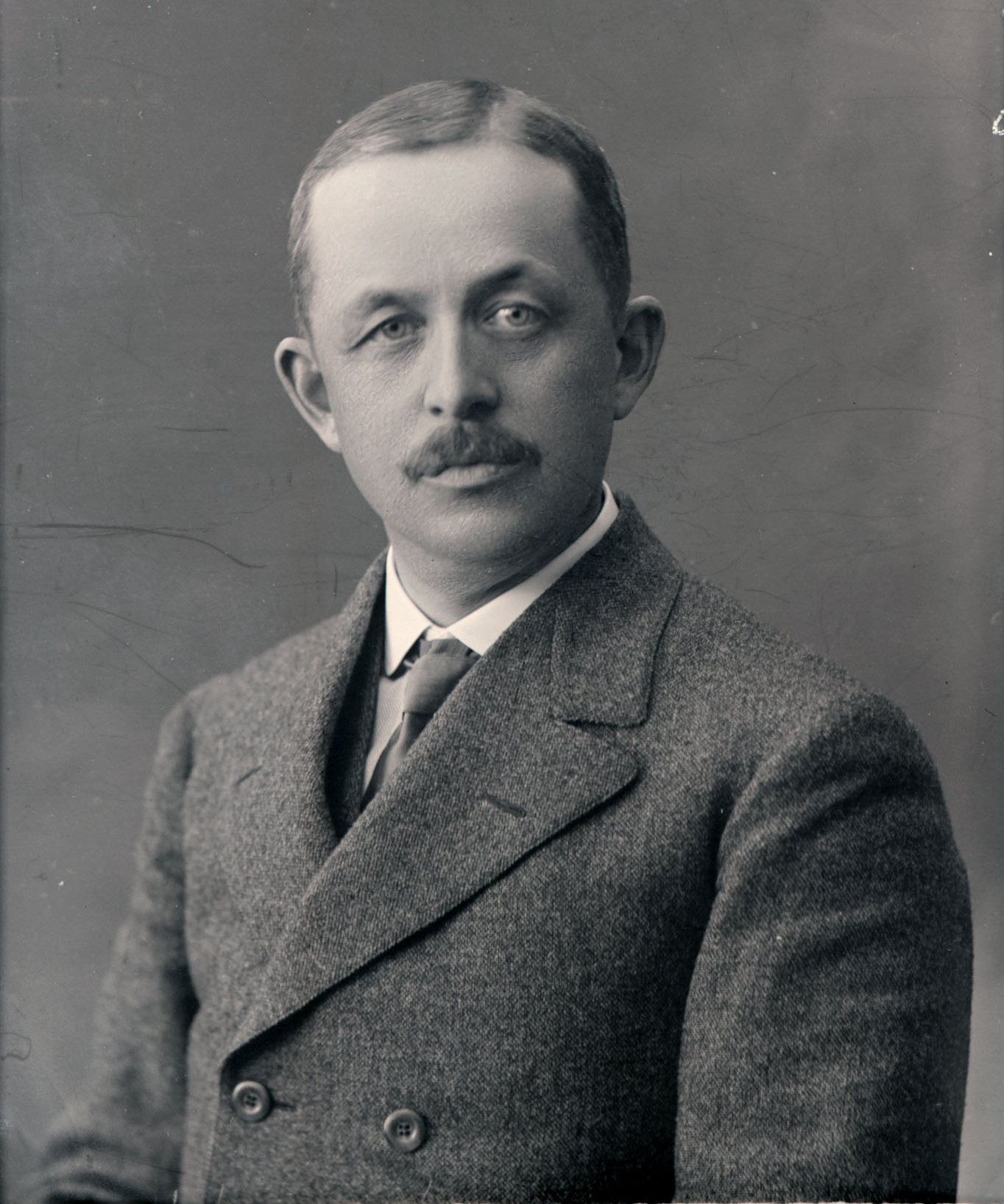 Johan Throne Holst (1868–1946), industrileder og politiker (Frisinnede Venstre).